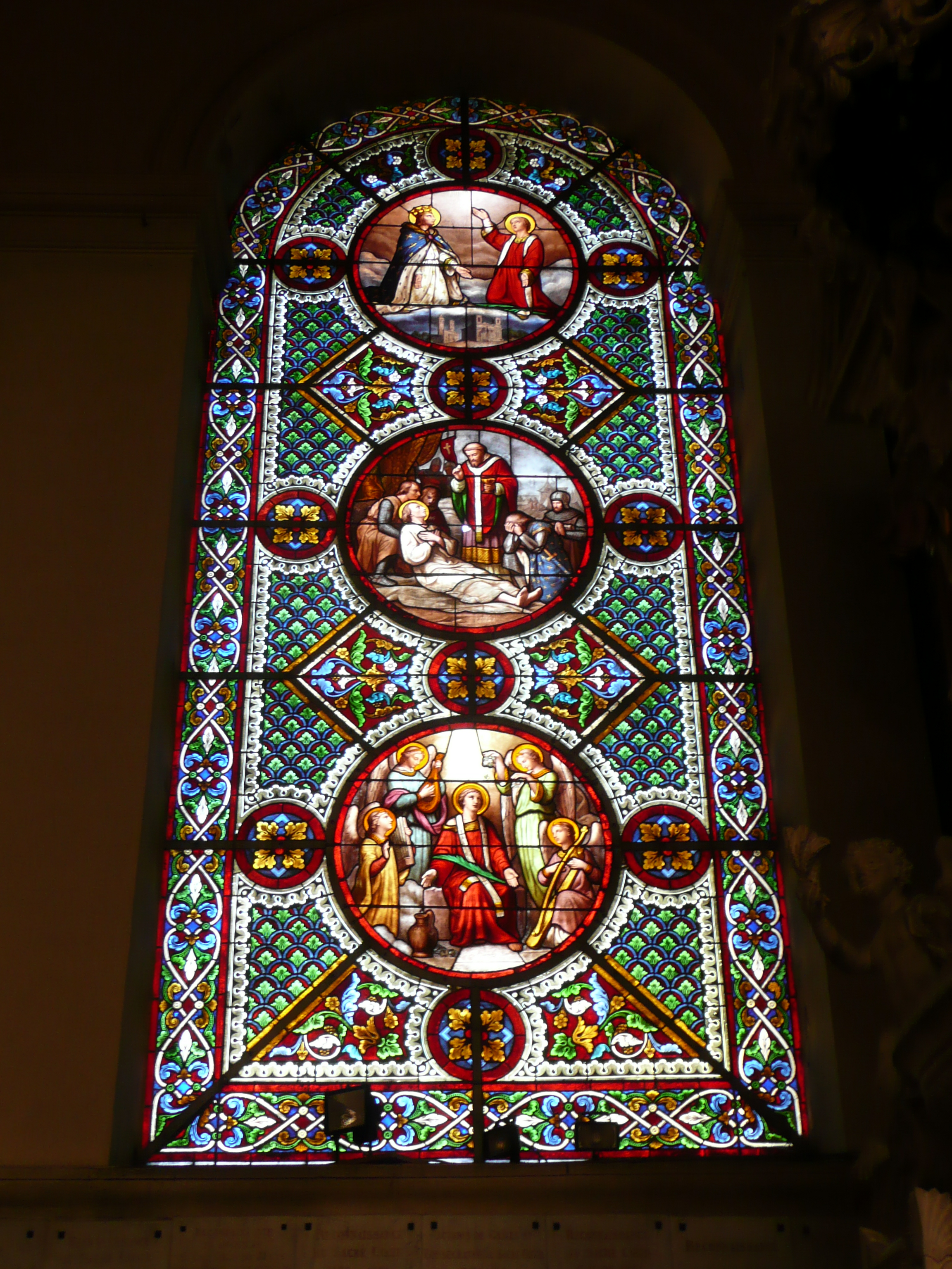 Vitrail de l'église cathédrale Saint-Vincent de Mâcon (France). Les vitraux de cet édifice sont l'œuvre de l'atelier lyonnais de Jean-Baptiste Barrelon. Ils ont été réalisés entre 1858 et 1878, et installés à partir des années 1860.